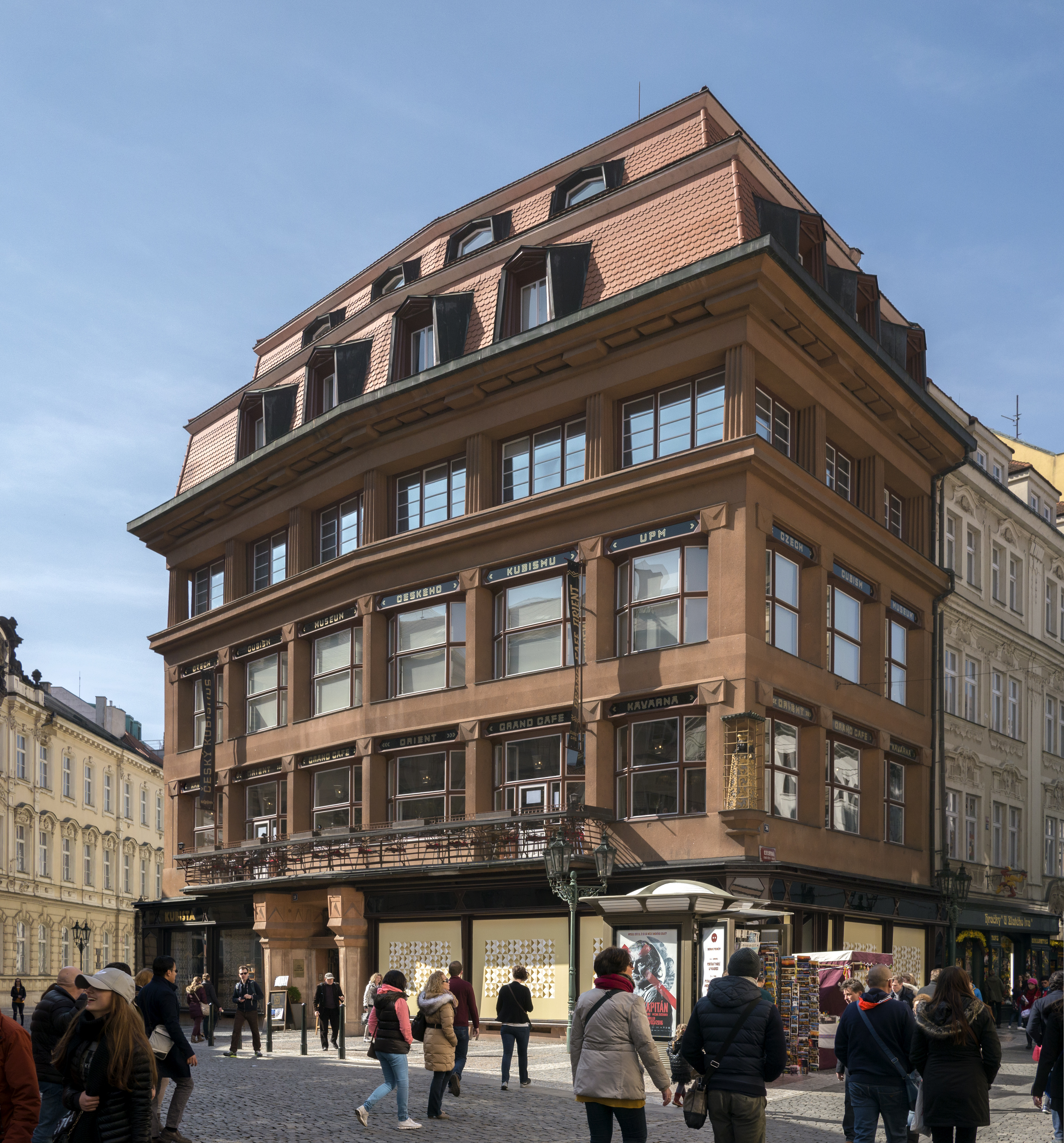 Prag Kubismus Schwarze Madonna